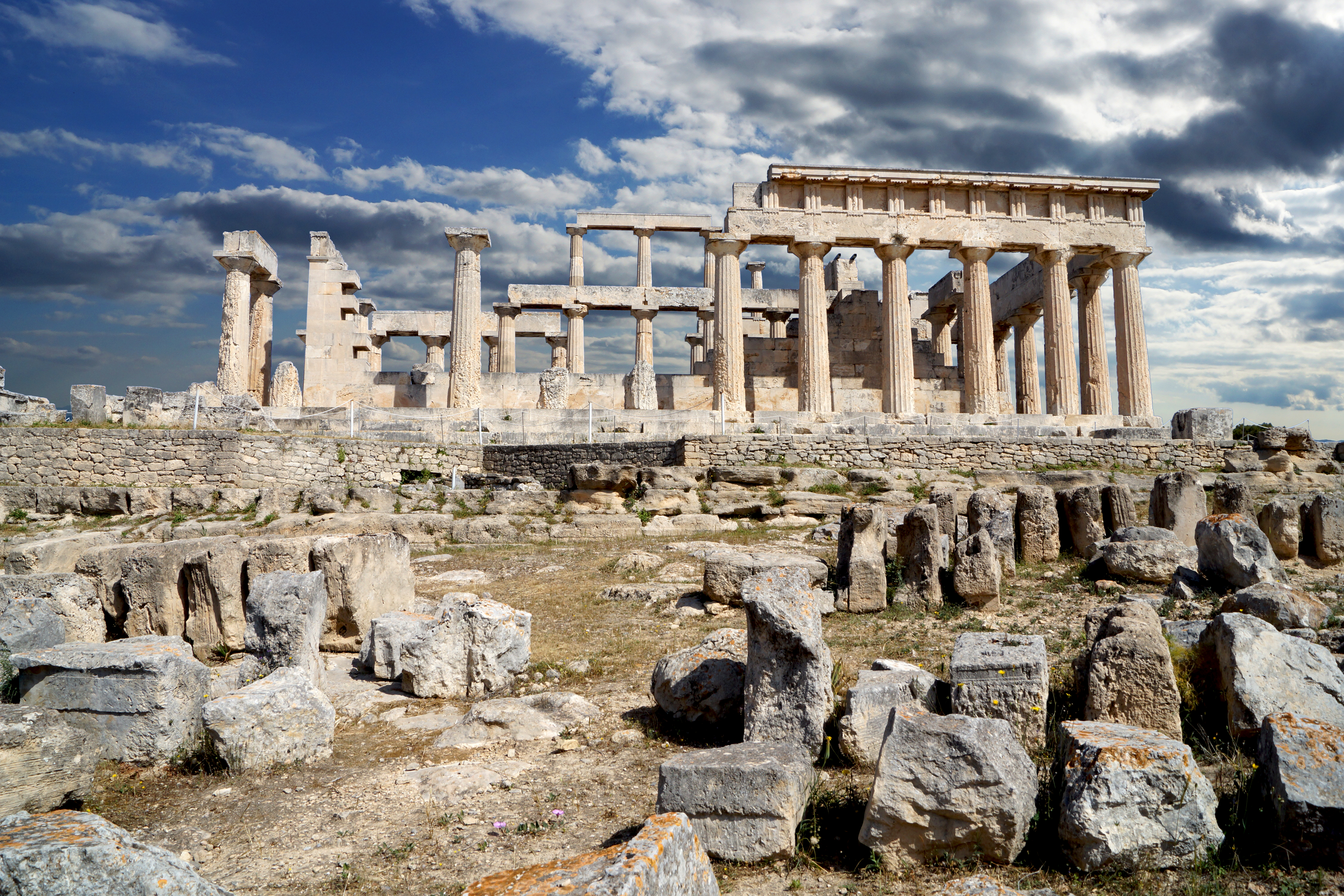 Ναός της Αφαίας«Ναός της Αφαίας»